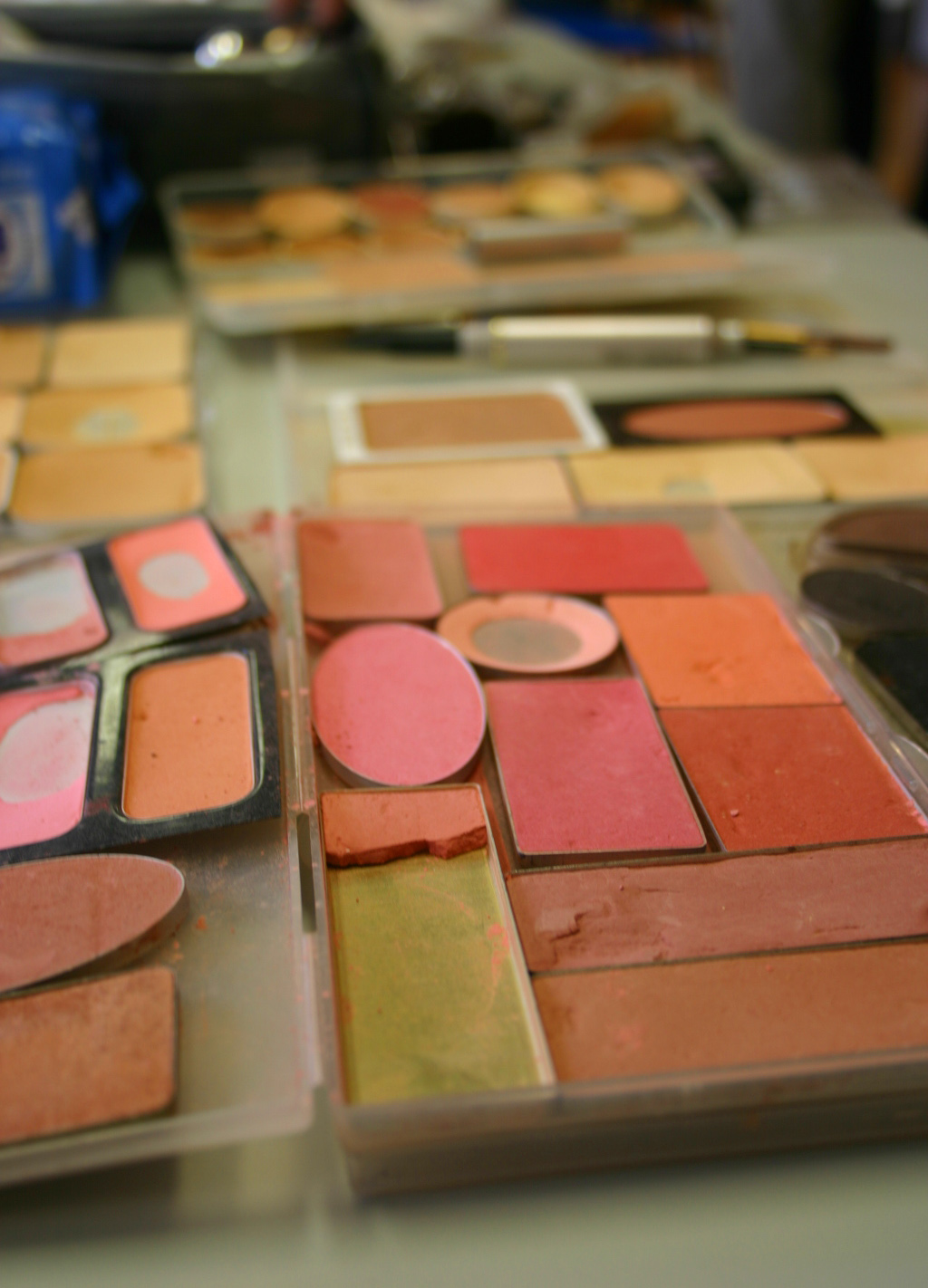 make-up.Make Up